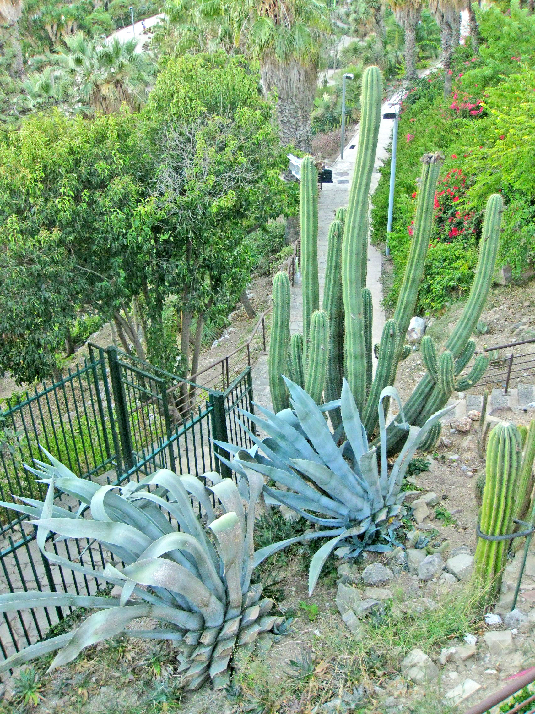 Jardins Mossèn Costa i Llobera, jardí botànic especialitzat en cactus, plantes suculentes i palmeres, al vessant est de Montjuïc, de cara al mar. Vista des dels jardins de Miramar. Detall d'uns cactus i unes atzavares.